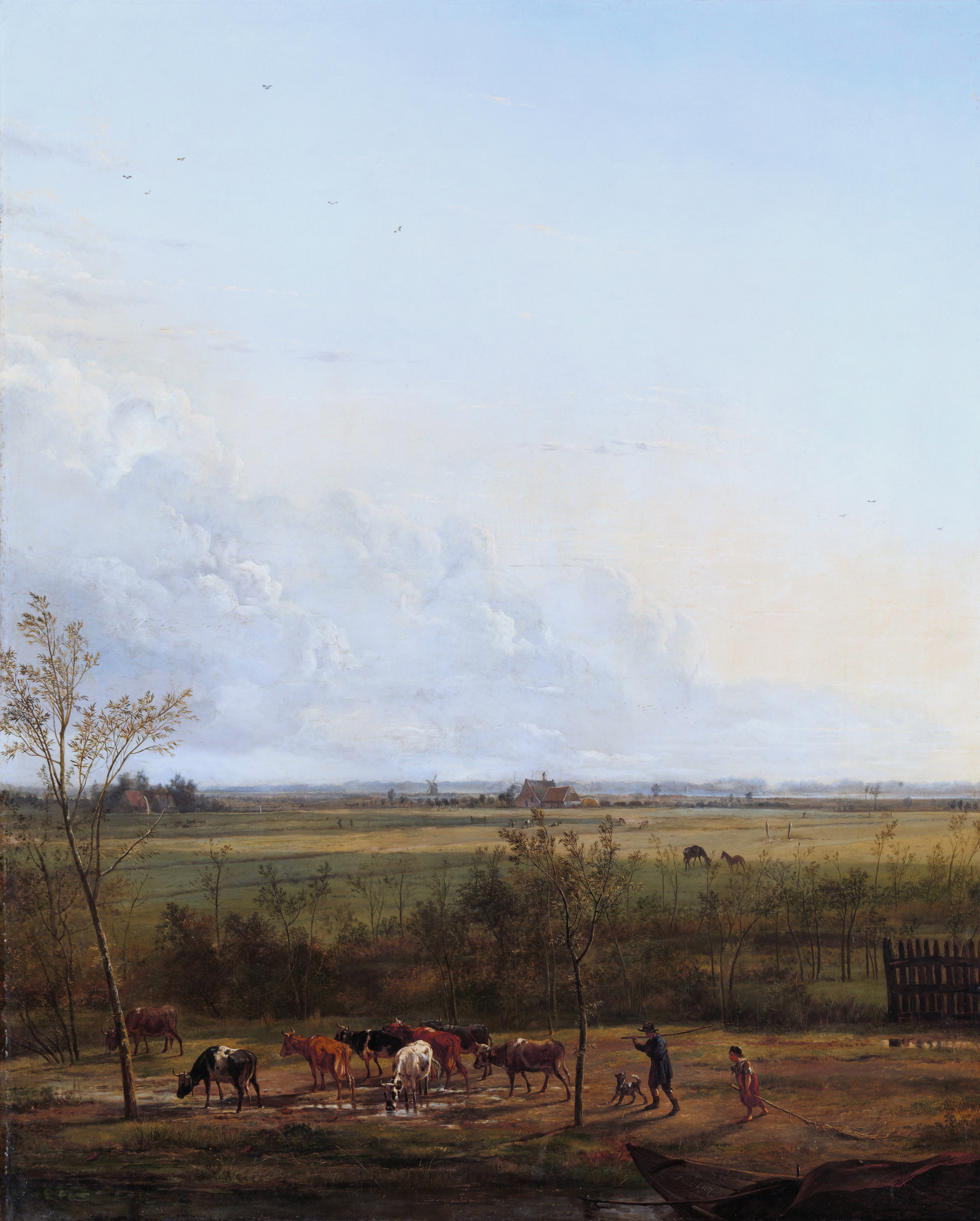 pendant of File:Pieter van Os Canal.jpg